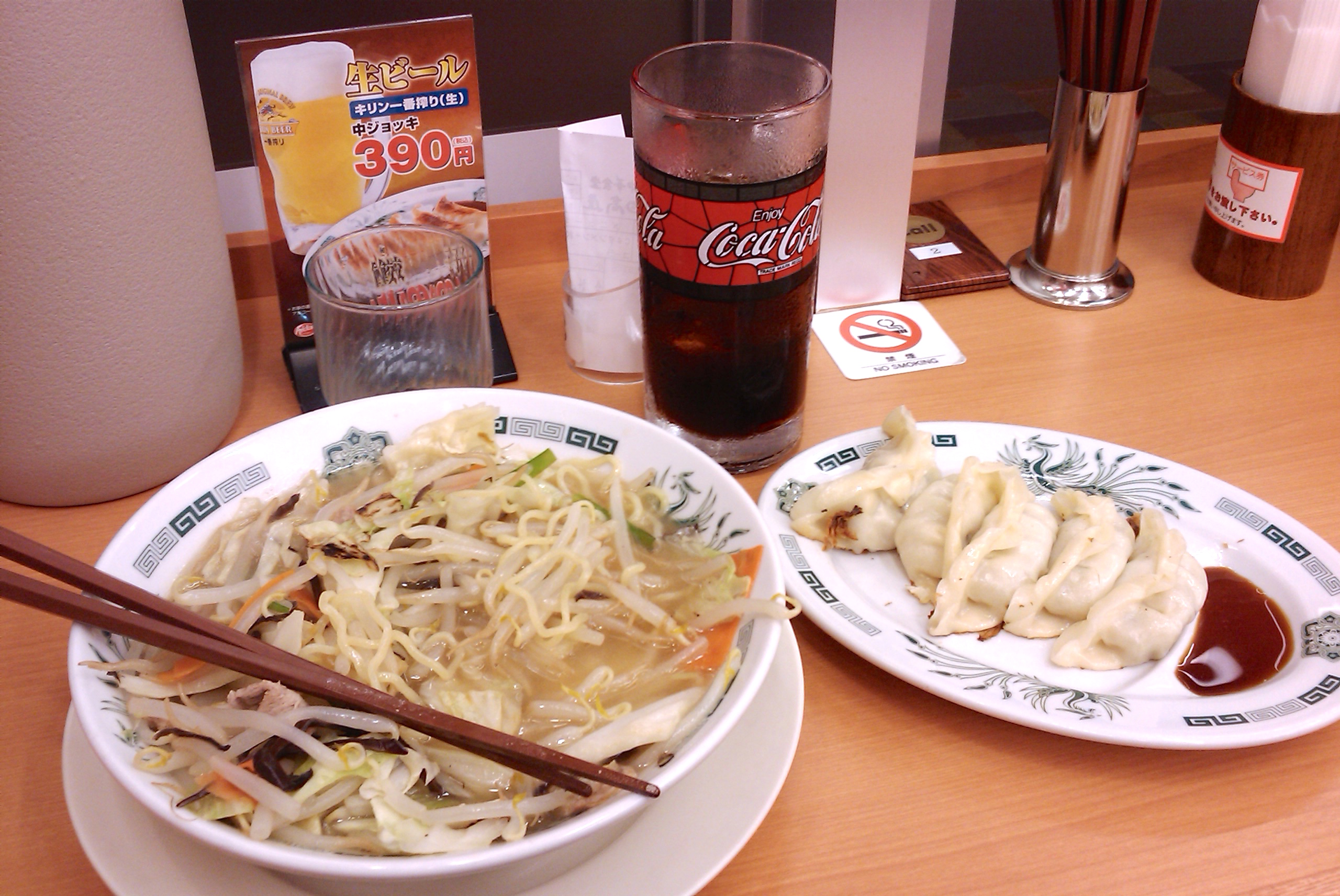 Ramen de Verdures amb empanades de carn (+ coke) [1]